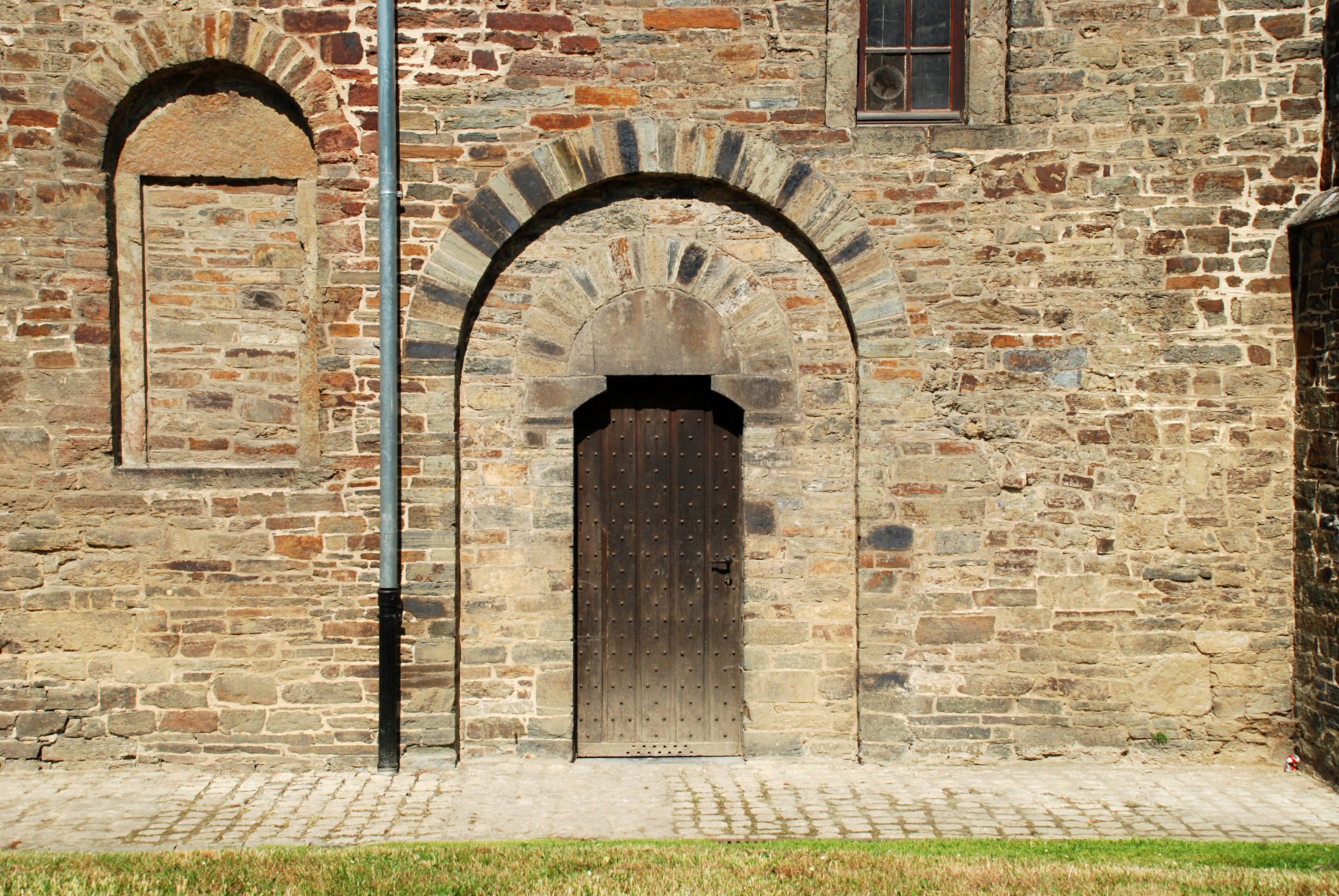 Belgique- Brabant wallon - Villers-la-Ville - ancien moulin abbatial